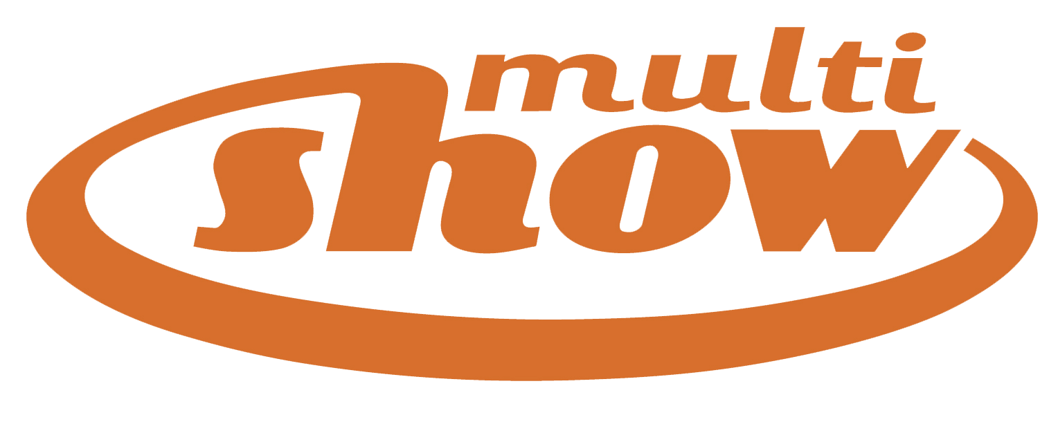 Logotipo do canal Multishow.